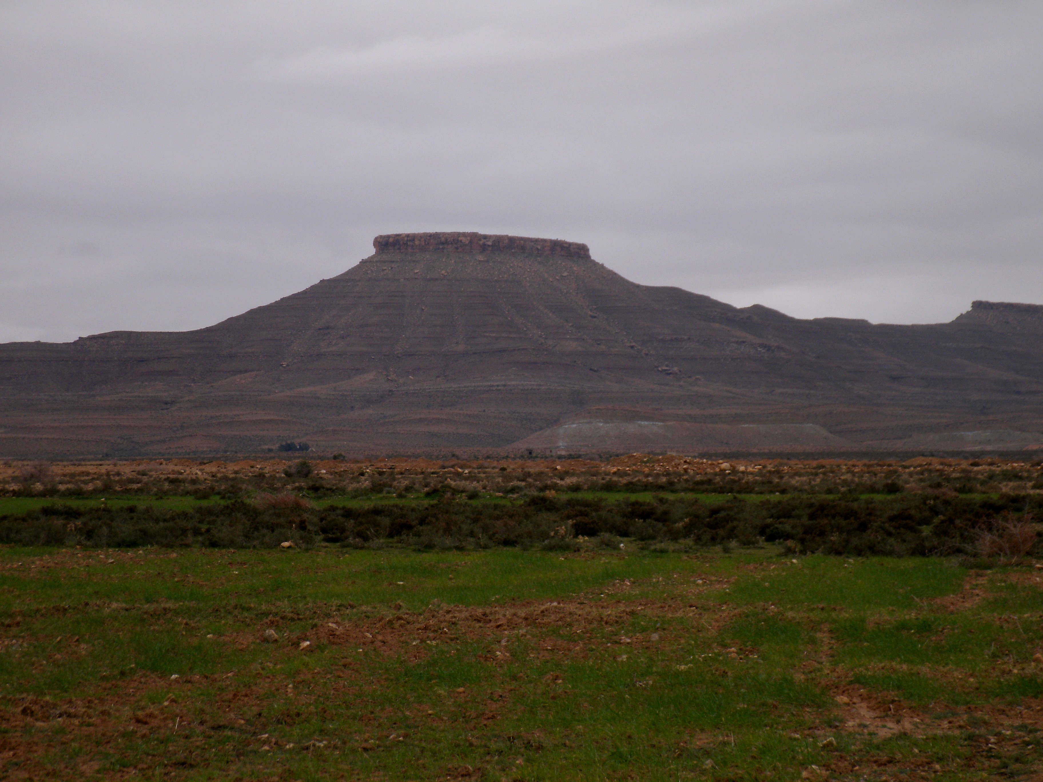 Le "brillard" en périphérie de Bou Saada